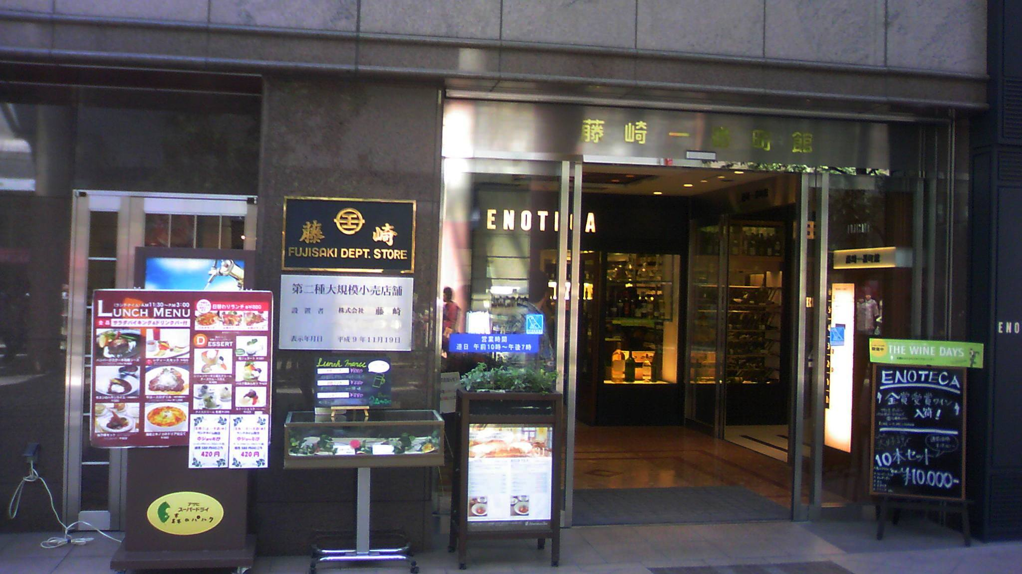 藤崎一番町館入口